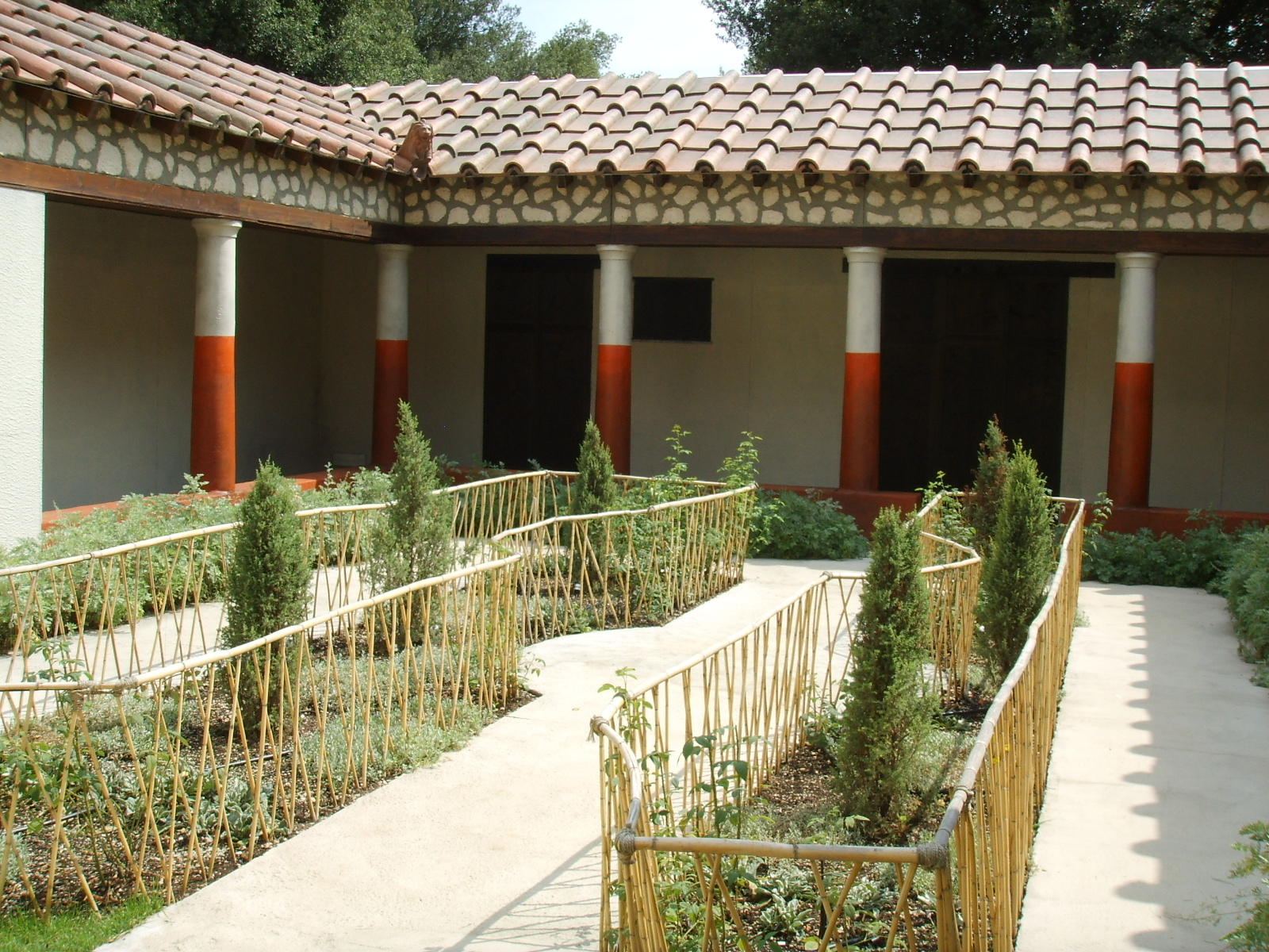 Ricostruzione del giardino della "Casa dei pittori al lavoro" di Pompei (mostra al Giardino di Boboli, 2007).